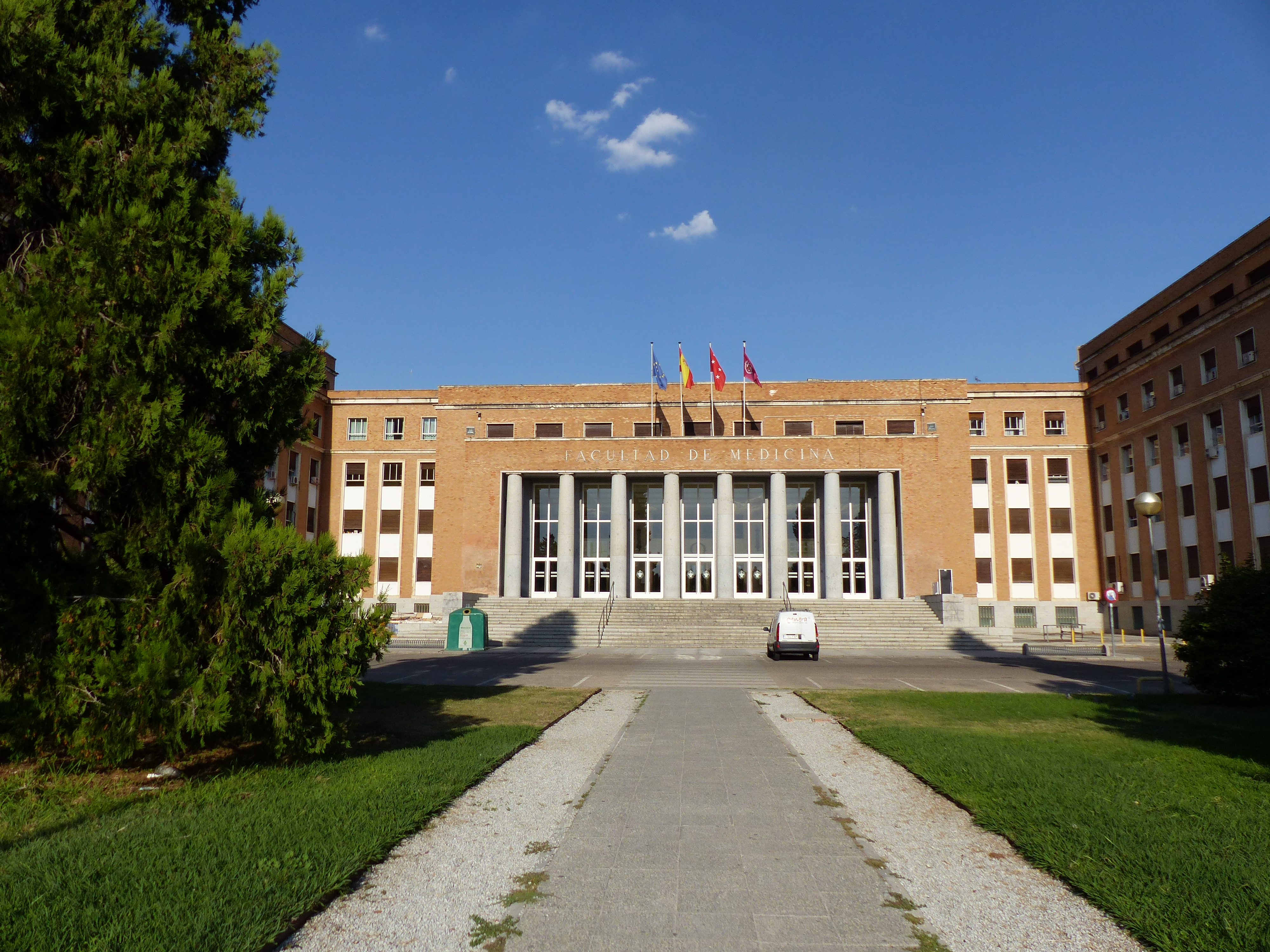 Facultad de Medicina